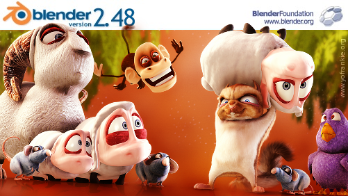 Blender 2.48 Splash Blender Foundation - Blender